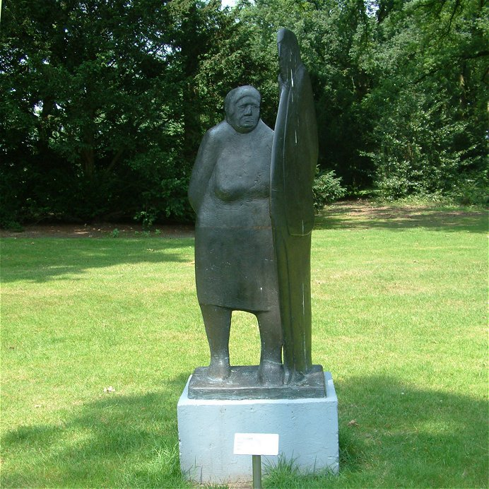 In het Stadswandelpark in Eindhoven. Kunstwerk: Onderweg, Kunstenaar: Guus Hellegers, 1979